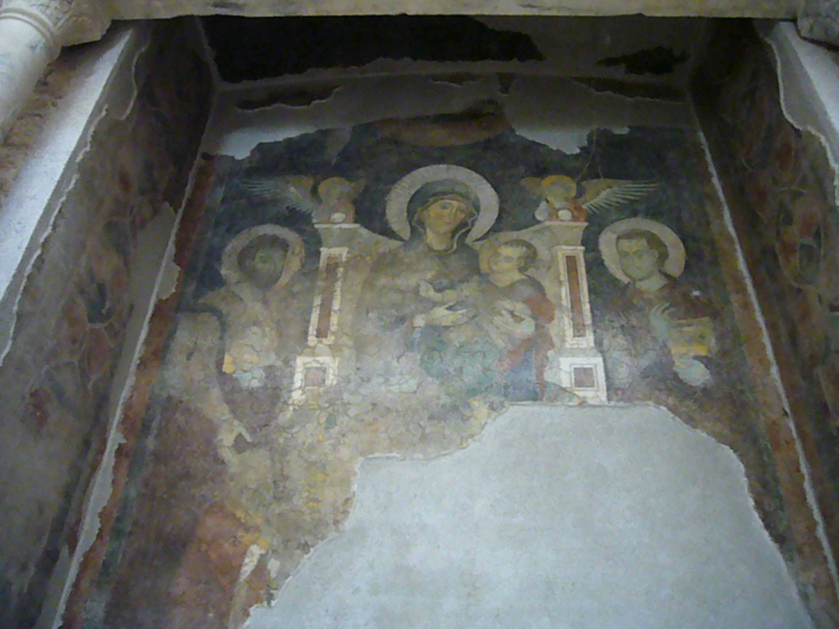 Roma, Tempio del Divo Romolo al Foro romano. Madonna in trono coni santi Cosma e Damiano